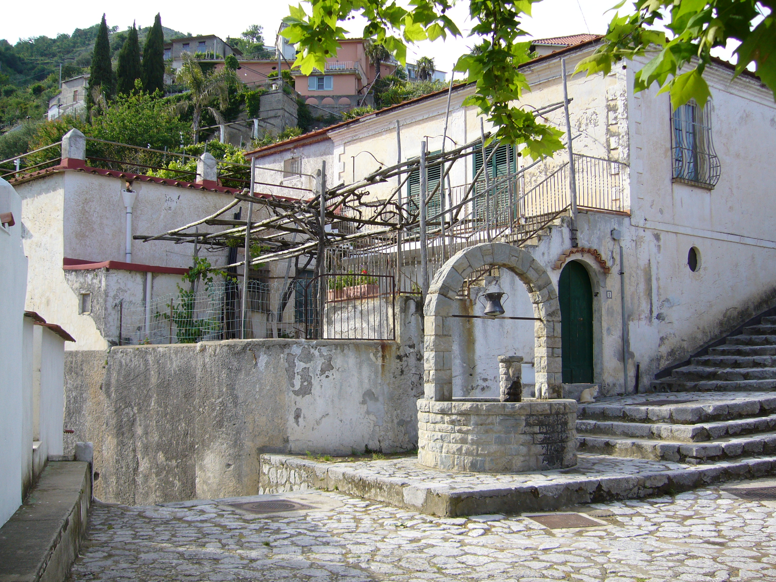 Minuta, Italy